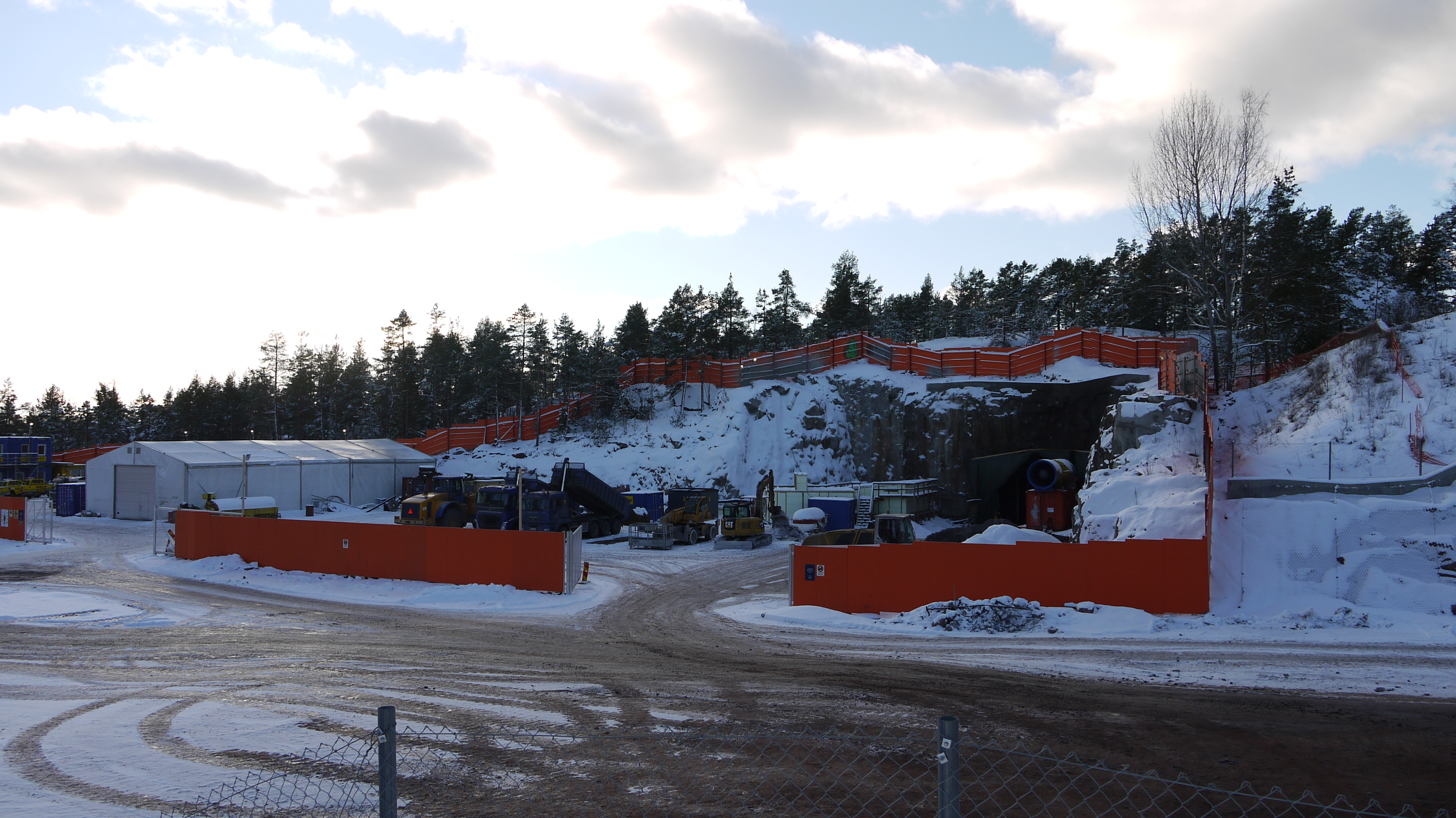 Finnoon metroaseman työtunneli